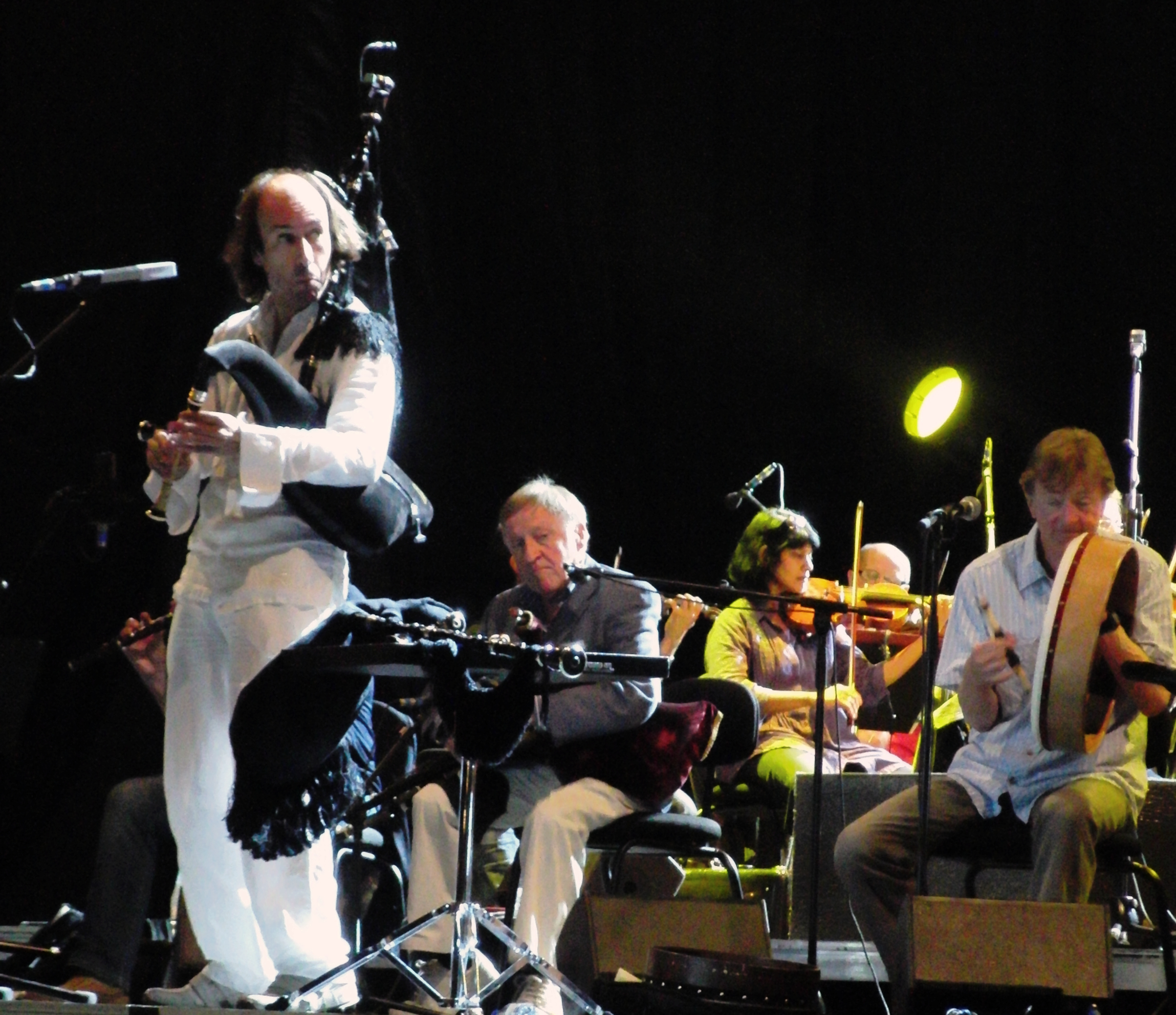 The Chieftains et Carlos Nuñez en concert sur la place de l'Obradoiro (Saint-Jacques-de-Compostelle) en 2009 : Carlos Nuñez, Paddy Moloney, Mat Molloy et Kevin Coneff.